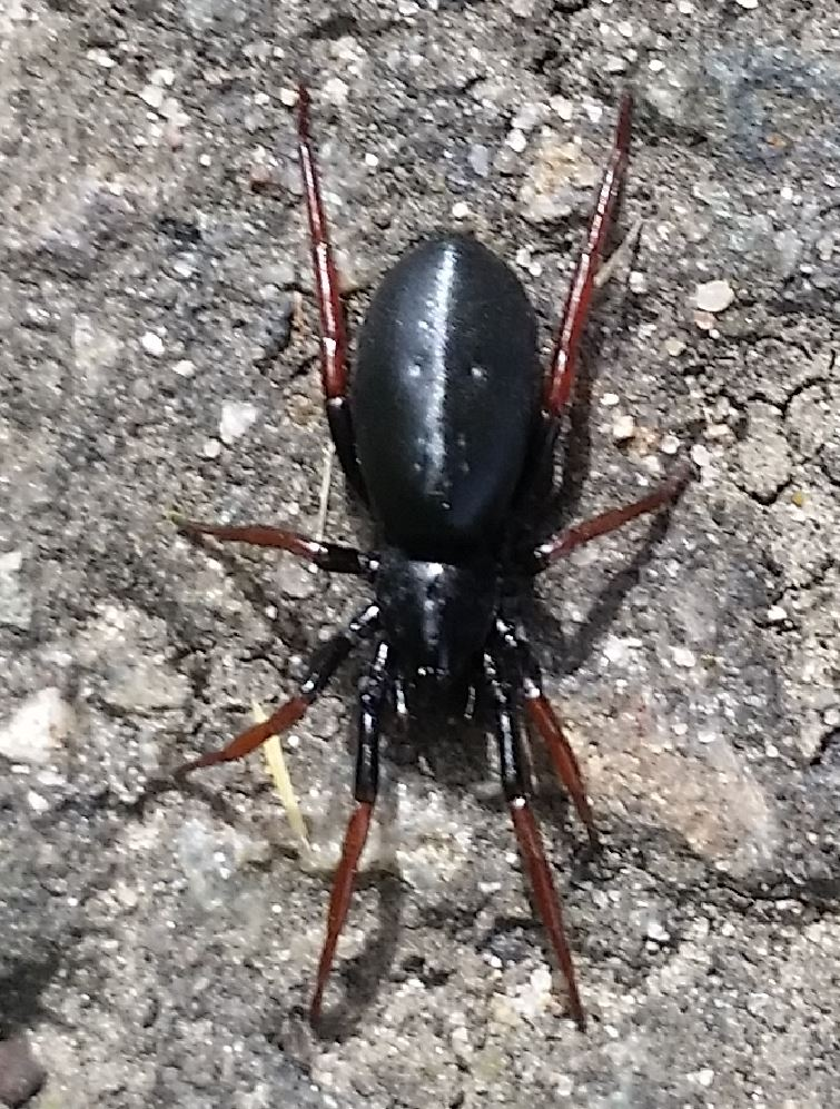 Spinne der Art Trachyzelotes pedestris, am 15.06.2016 im Schwetzinger Hardt